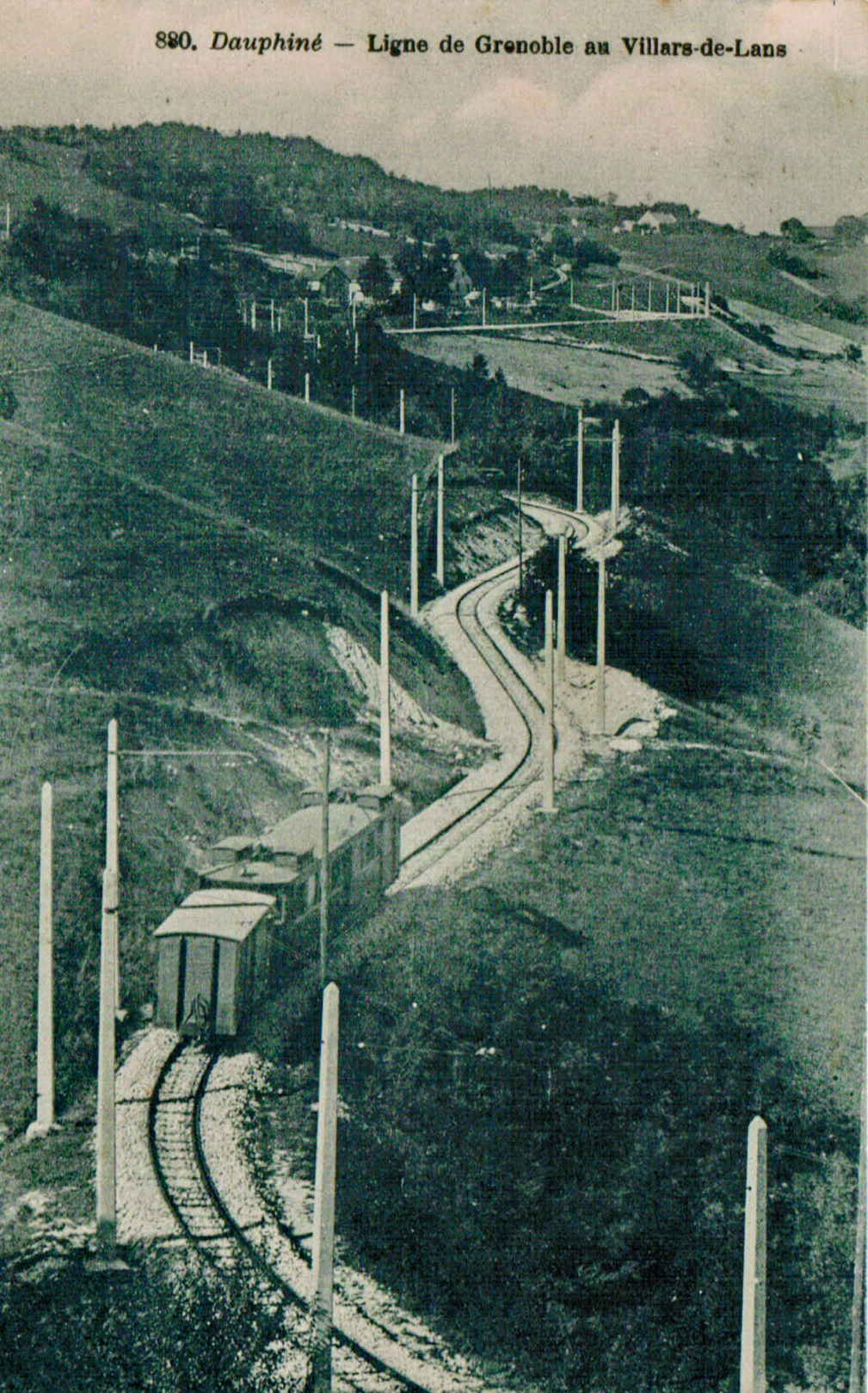 Carte postale ancienne éditée par Bourcier à Grenoble : DAUPHINÉ : Ligne de Grenoble à Villars-de-Lans